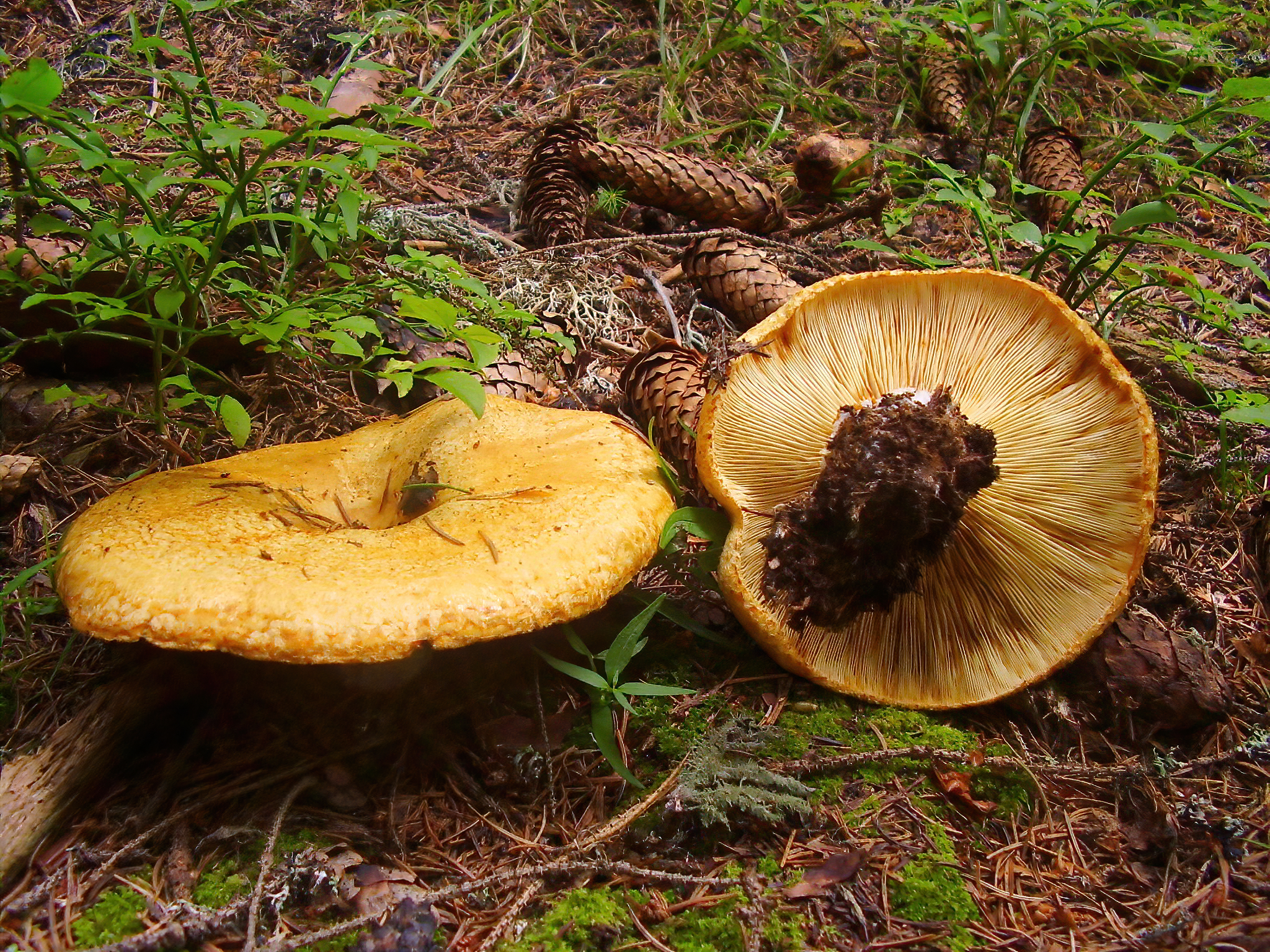 Lactarius scrobiculatus in coniferous forest in Bulgaria.